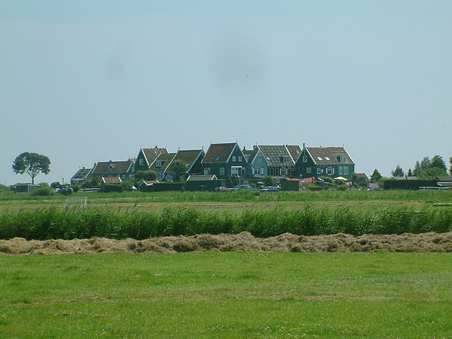 Een van de 'werven' op Marken. Eigen foto Jan Lapère.